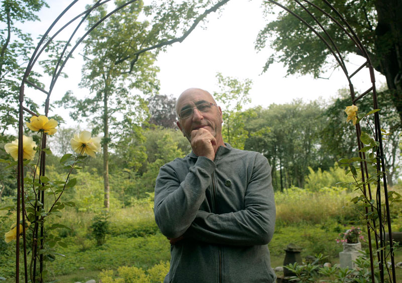 Andrea Abati, artista e fotografo.